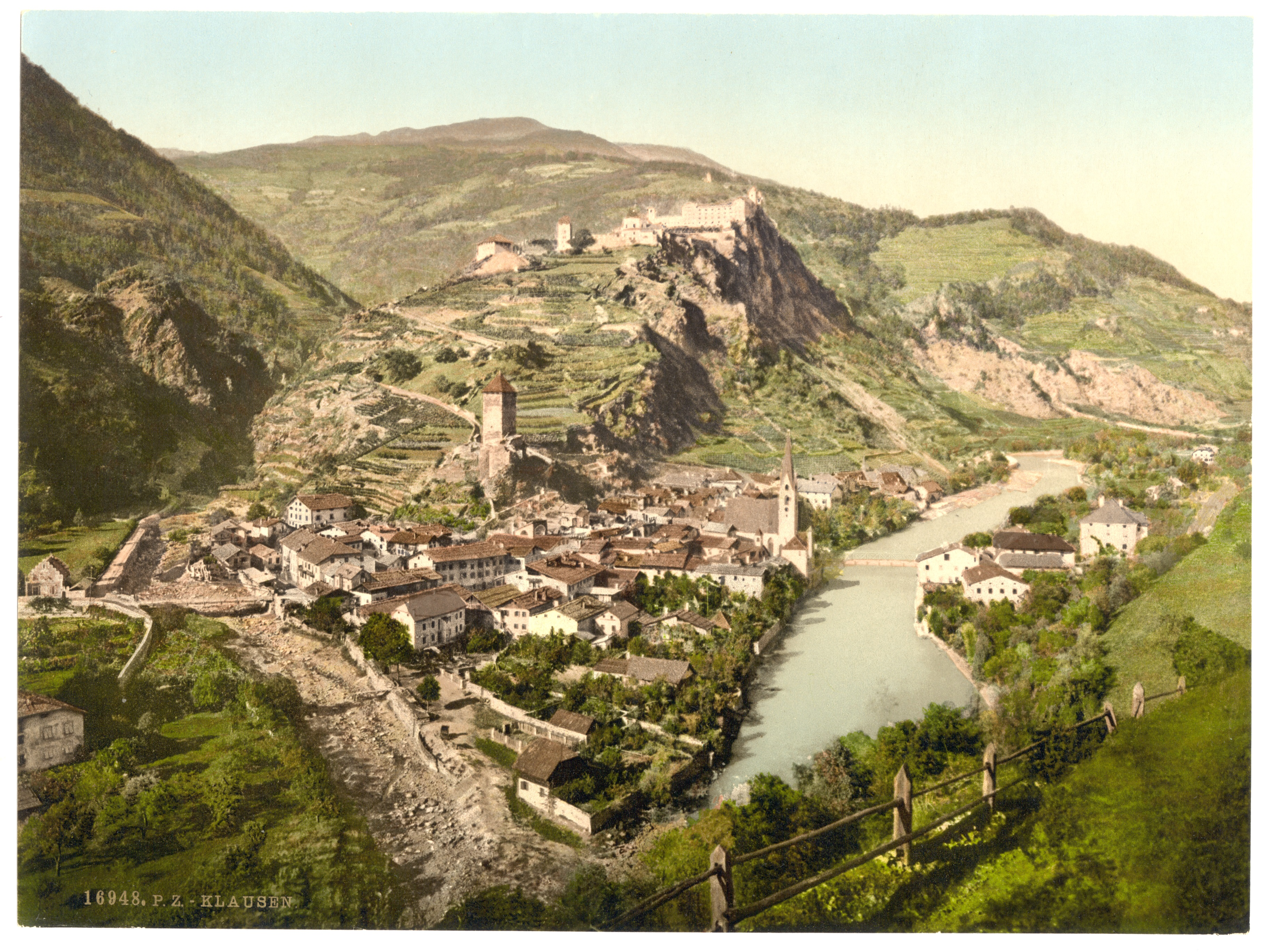 Klausen in Südtirol, damals Österreich-Ungarn, heute Italien.